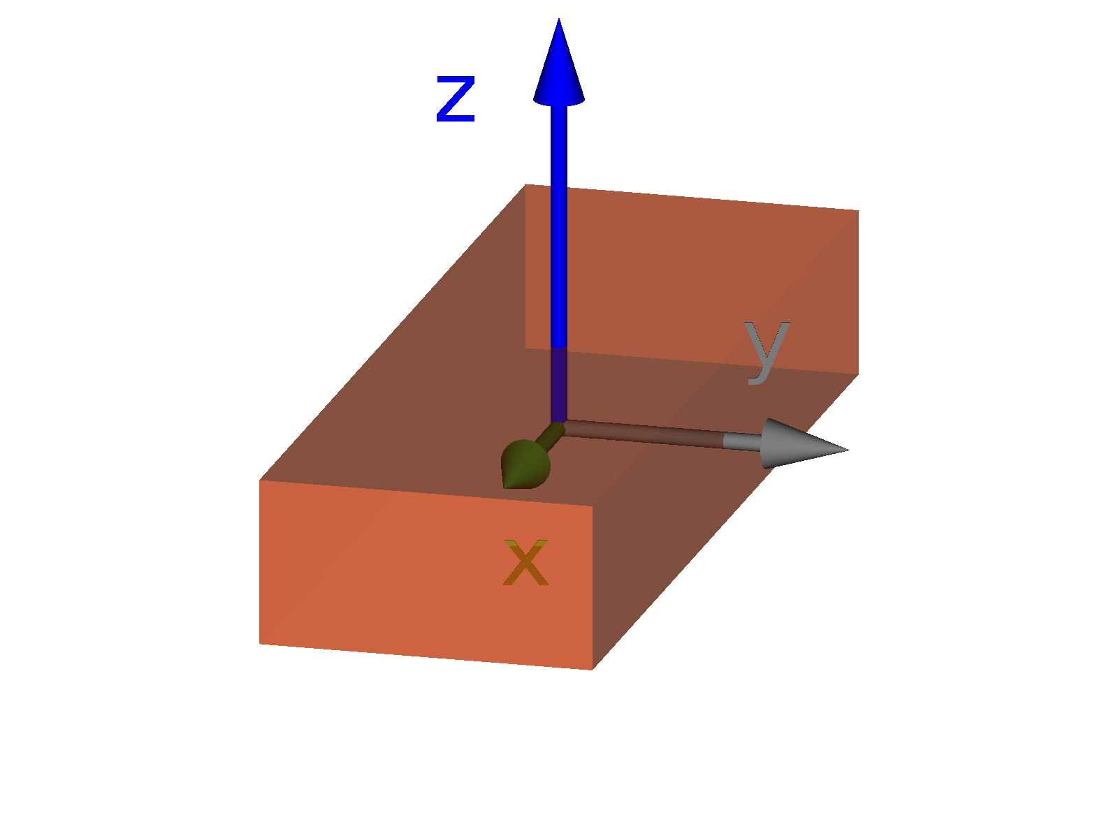 Hauptträgheitsachsen eines Quaders